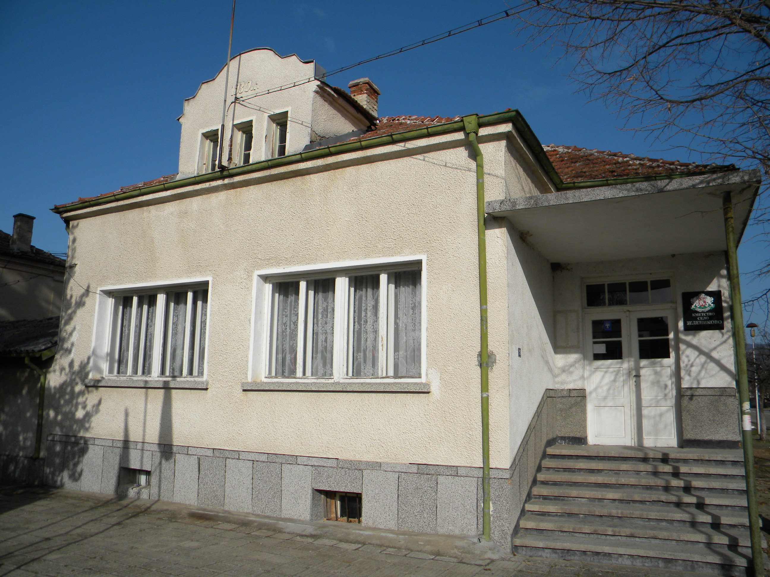 Кметството на село Зелениково